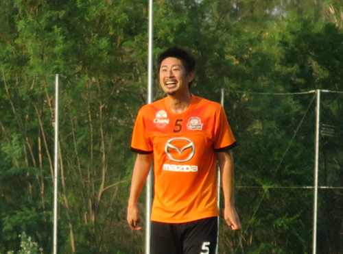 Satoshi Nagano